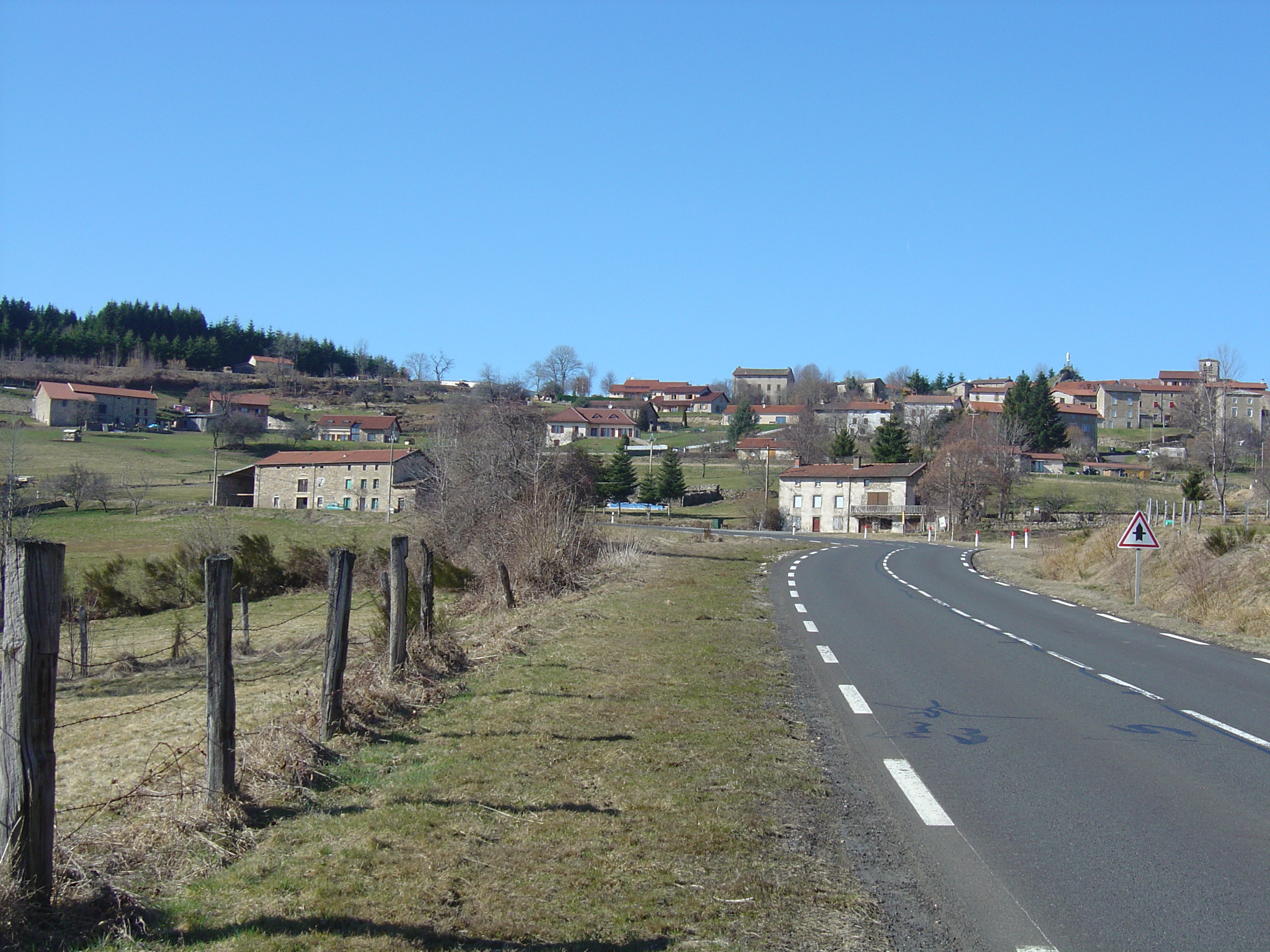 Le Monestier (63) vu depuis la route du col des Fourches